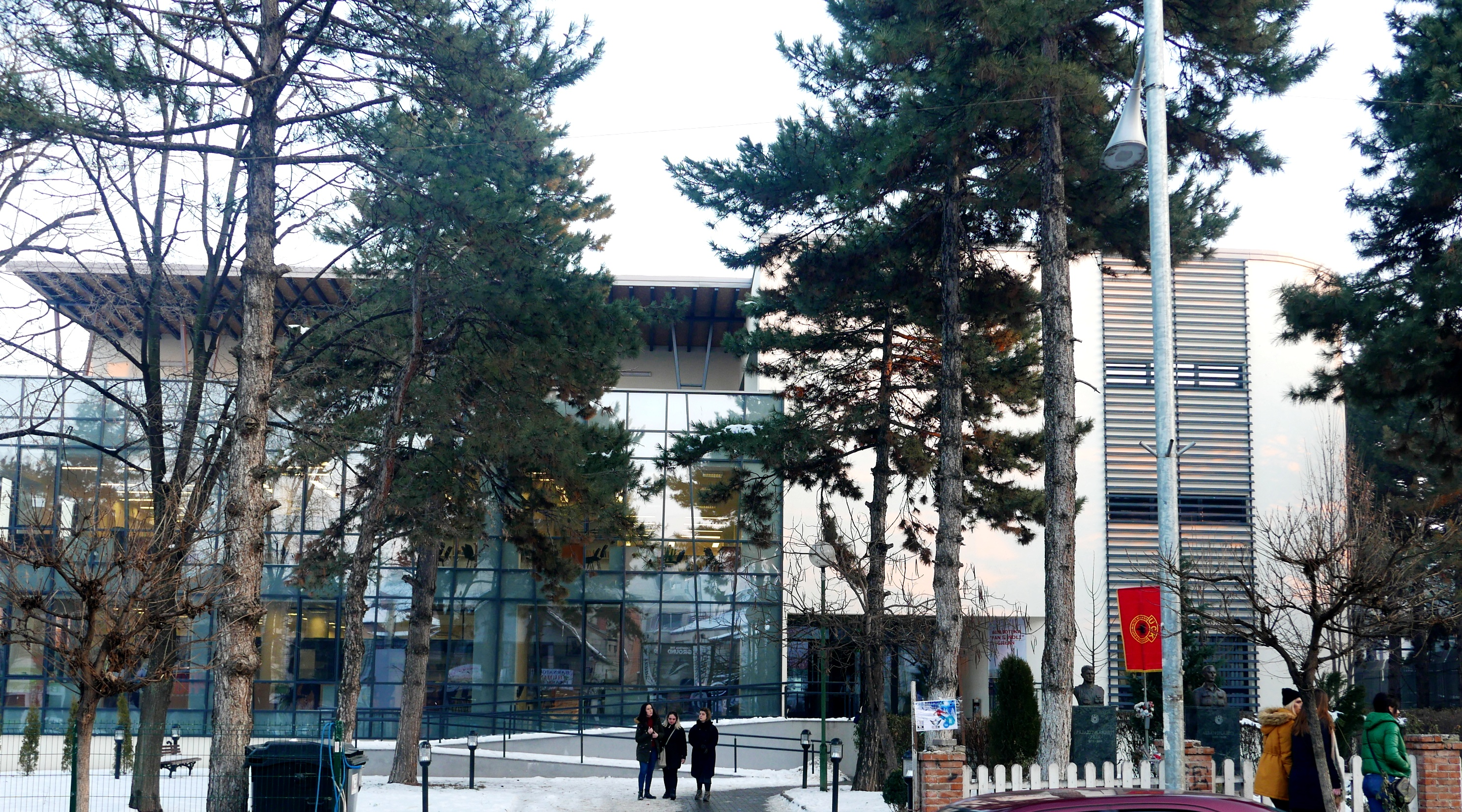 Biblioteka e Gjlanit